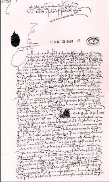 Pragmática Sanción de 1499